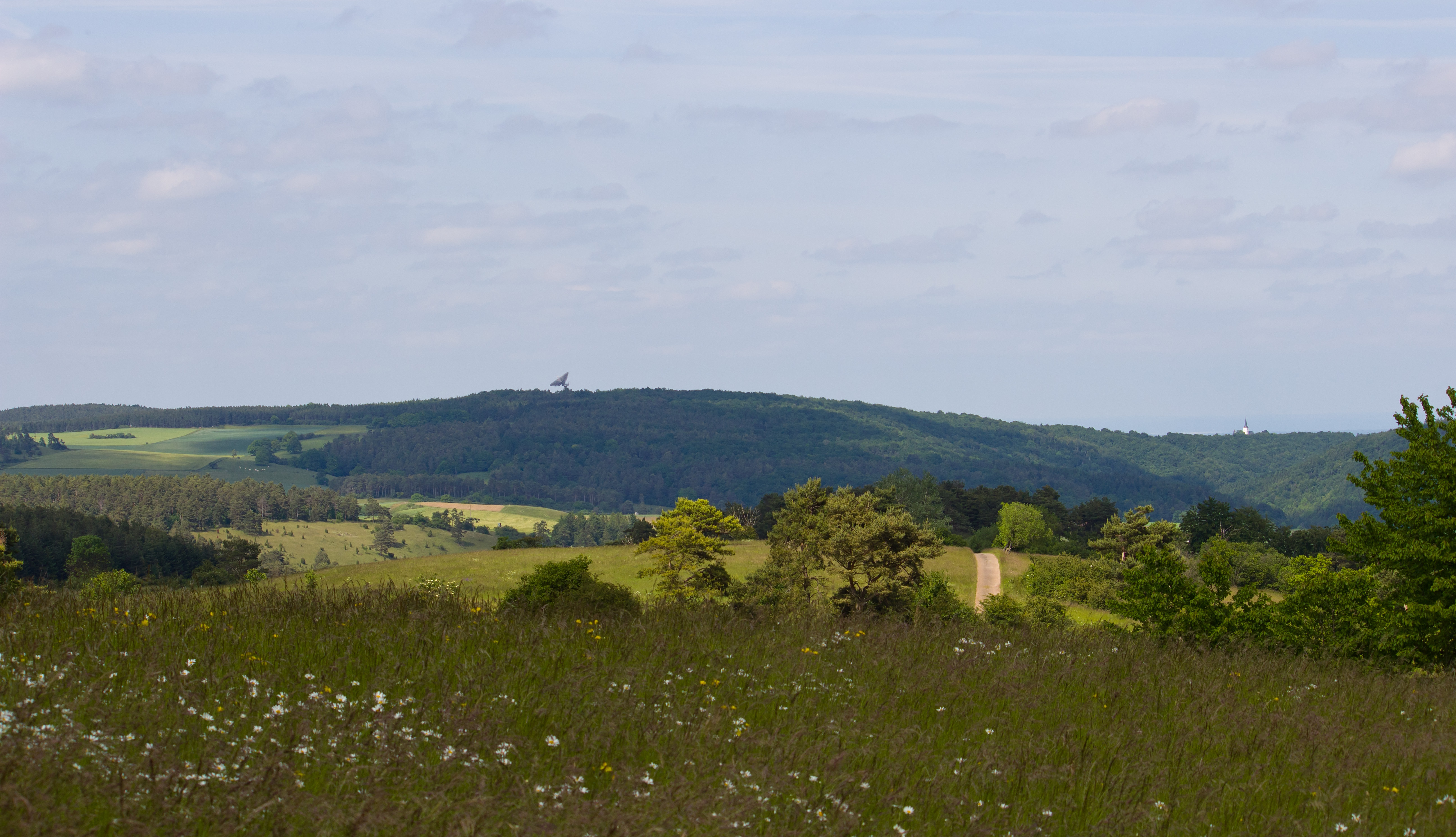 Blick vom Jakob-Kneip Berg zum Stockert, NSG „Eschweiler Tal und Kalkkuppen“